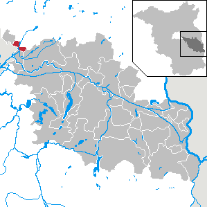 Woltersdorf in Brandenburg (Country) - District Oder-Spree